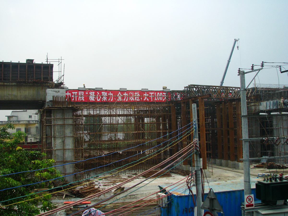 建设中的广珠城际轨道交通